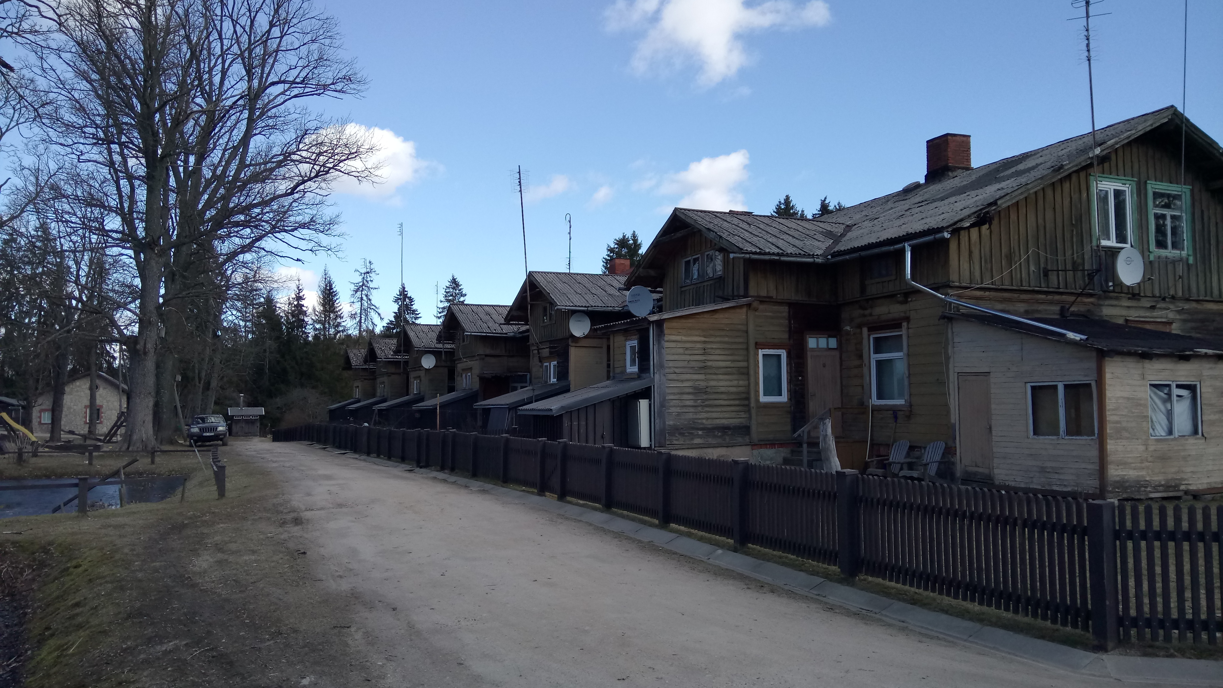 Skolaskalna dzīvojamās ēkas mūsdienās